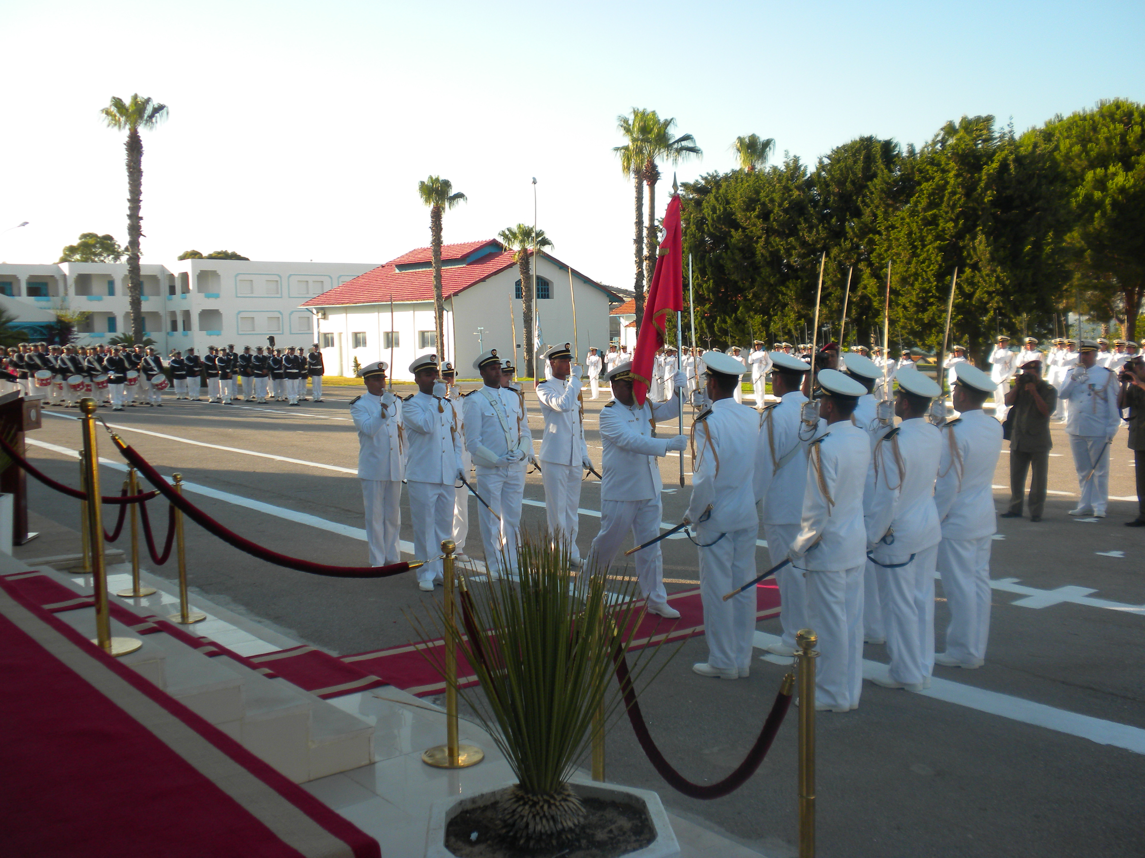 Le levé du drapeau lors de la cérémonie de fin d'année à l'Académie Navale à Menzel Bourguiba .